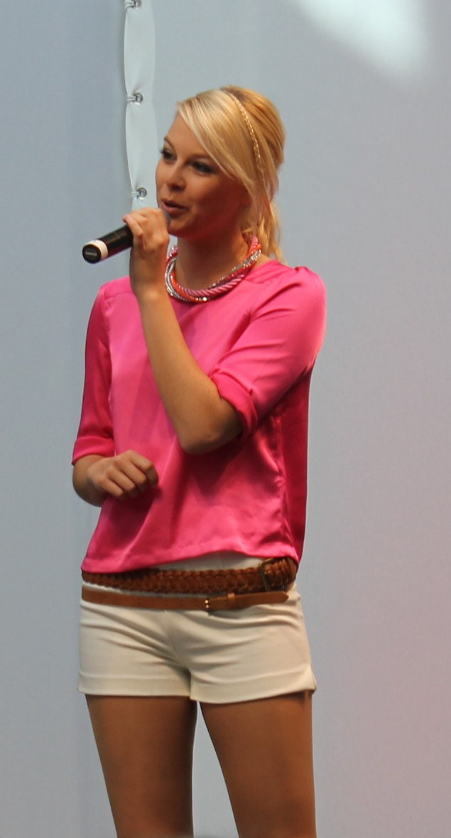 Linda Fäh (Miss Schweiz 2009) als Sängerin an einer Modeschau.